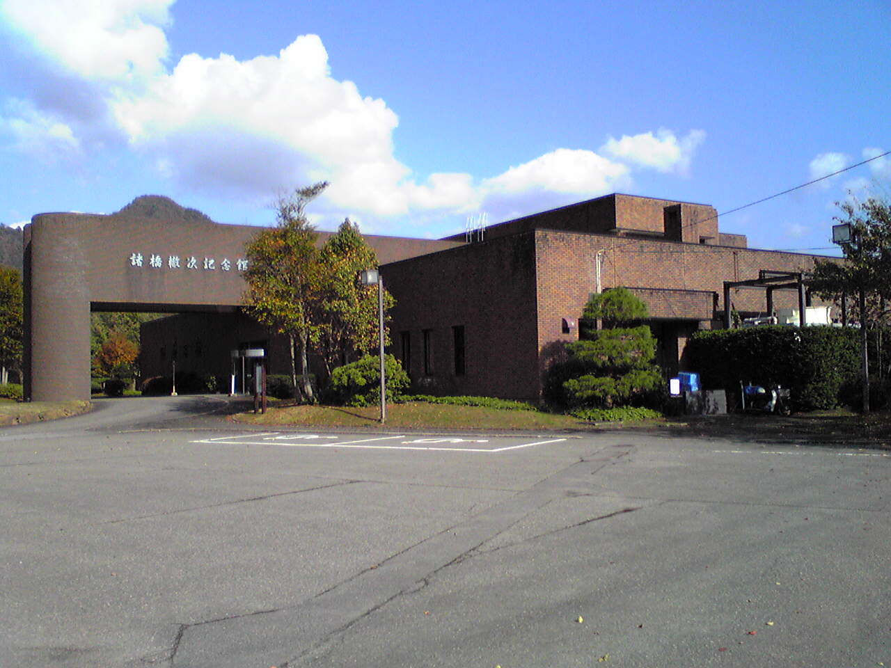 Tetsuji Morohashi Memorial Museum, Japan.